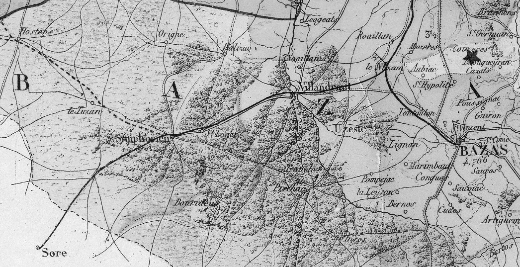 Détail carte de la Gironde éditée en 1878, avec le tracé du chemin de fer de Nizan à Sore et ses embranchements existant (Le Nizan) et projeté (Saint-Symphorien).